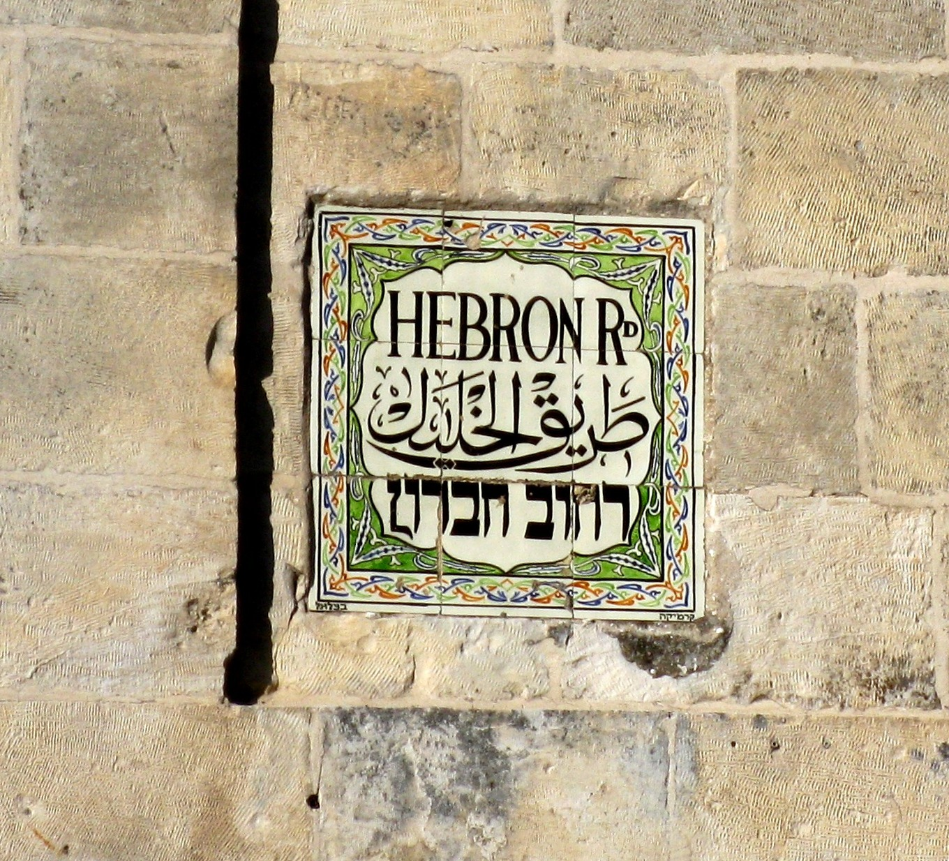 Jérusalem ouest - Une plaque de rue de l'époque britannique (années 1920)(l'anglais est en haut et l'hébreu en bas, aujourd'hui c'est l'inverse) - carreaux en céramique réalisés par des artistes de l'école Bezalel. On peut lire sur la bordure inférieure : קרמיקה בצלאל ce qui signifie "Céramique Bezalel".